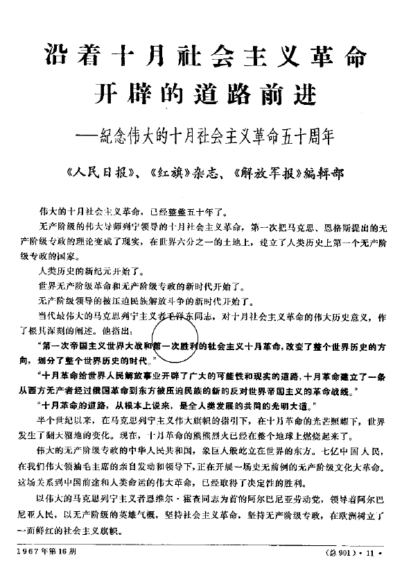 《红旗》期刊《沿着十月社会主义革命开辟的道路前进》，继续革命论，1967年11月 第16期 11-15页